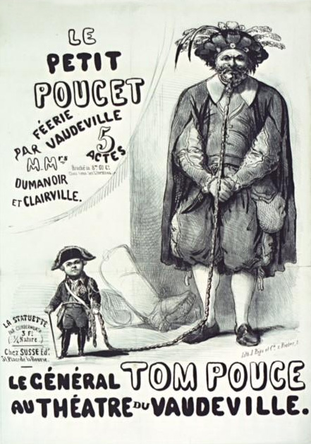 Le Petit Poucet, féérie vaudeville par M M Dumanoir et Clairvile;... chez tous les libraires... Le général Tom Pouce au théatre du Vaudeville : affiche